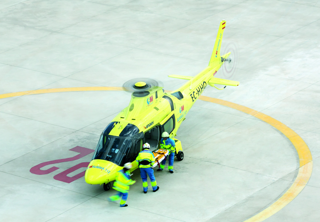 AW109 en Las Rozas evacuando a un paciente.